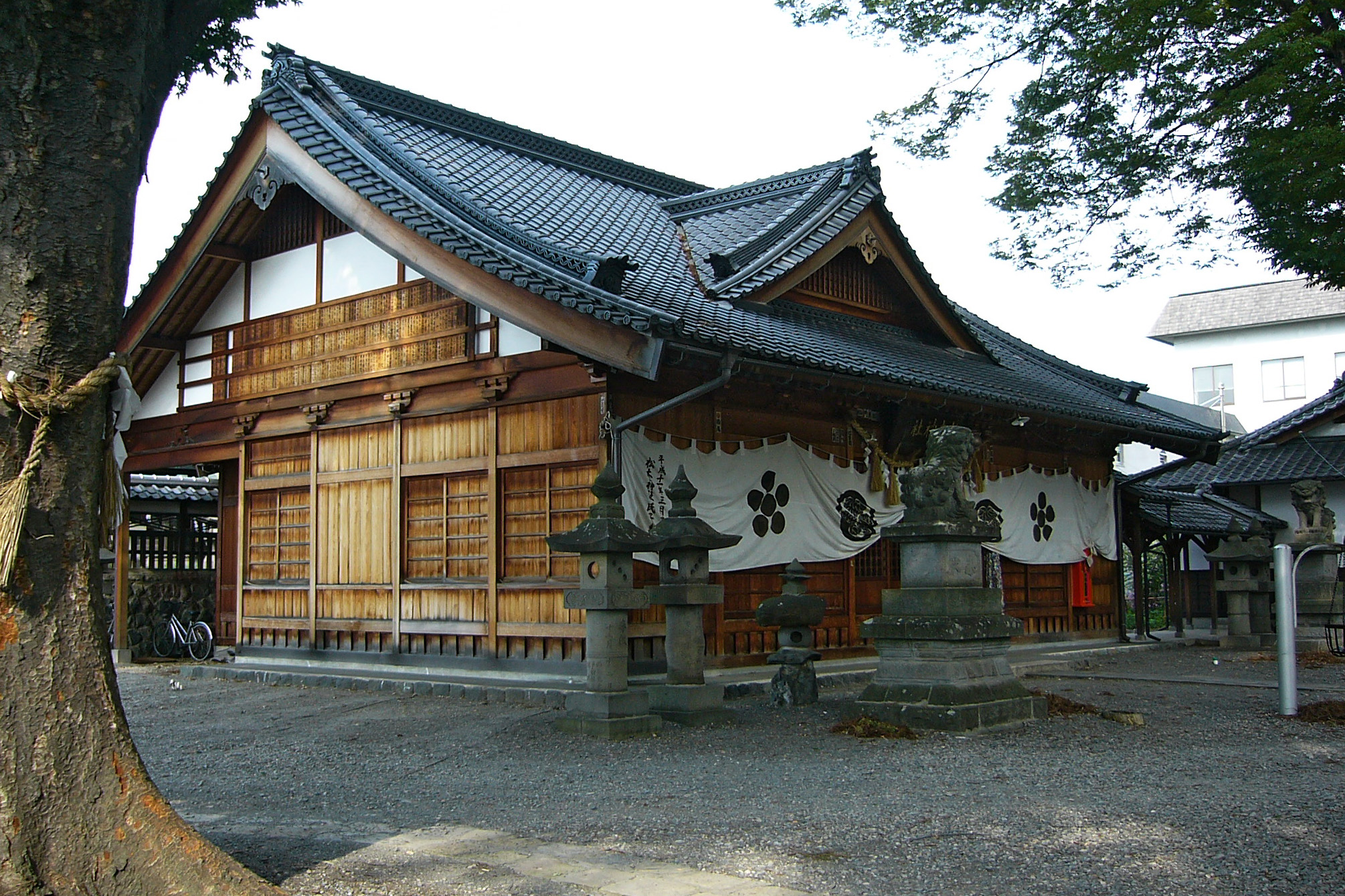 Matsumoto-jinja in Matsumoto, Nagano, Japan